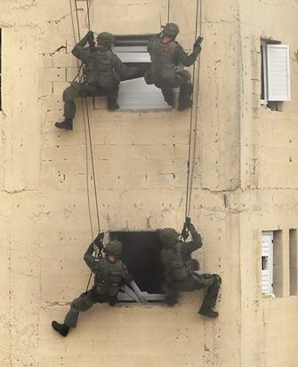 תצוגת פריצה וטג"ח של יחידת הימ"מ בפני ראש ממשלת ישראל בנימין נתניהו